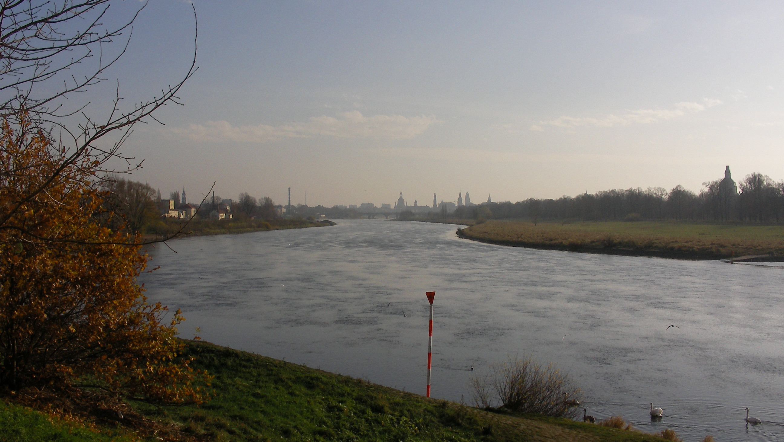 Die Elbe in Dresden, aufgenommen vom Pieschener Elbufer. Hinten die Marienbrücke, rechts ein Turm im Ostragehege